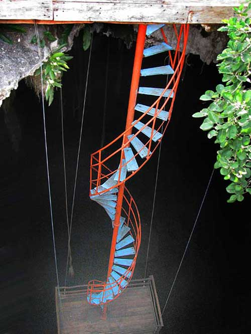 A cenote near Sabacché, Yucatán, MÉXICO.